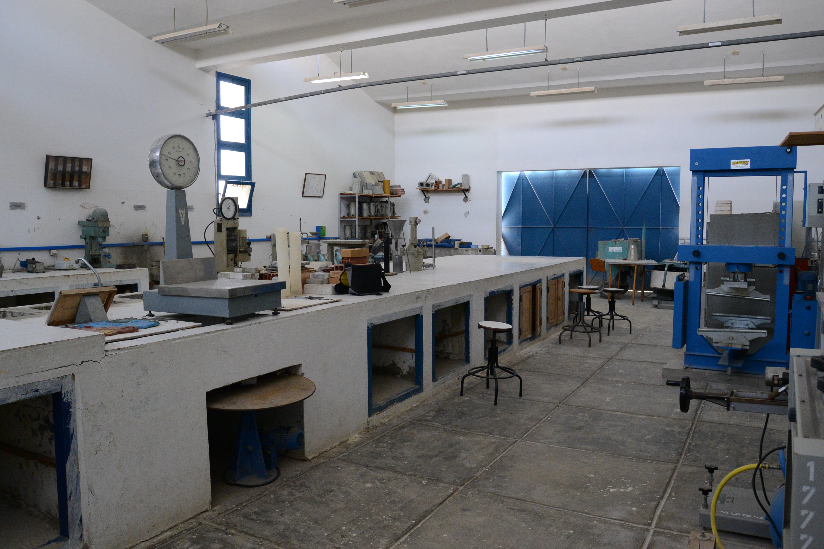 Vue générale du laboratoire des matériaux de construction à l'Iset de Nabeul, Tunisie